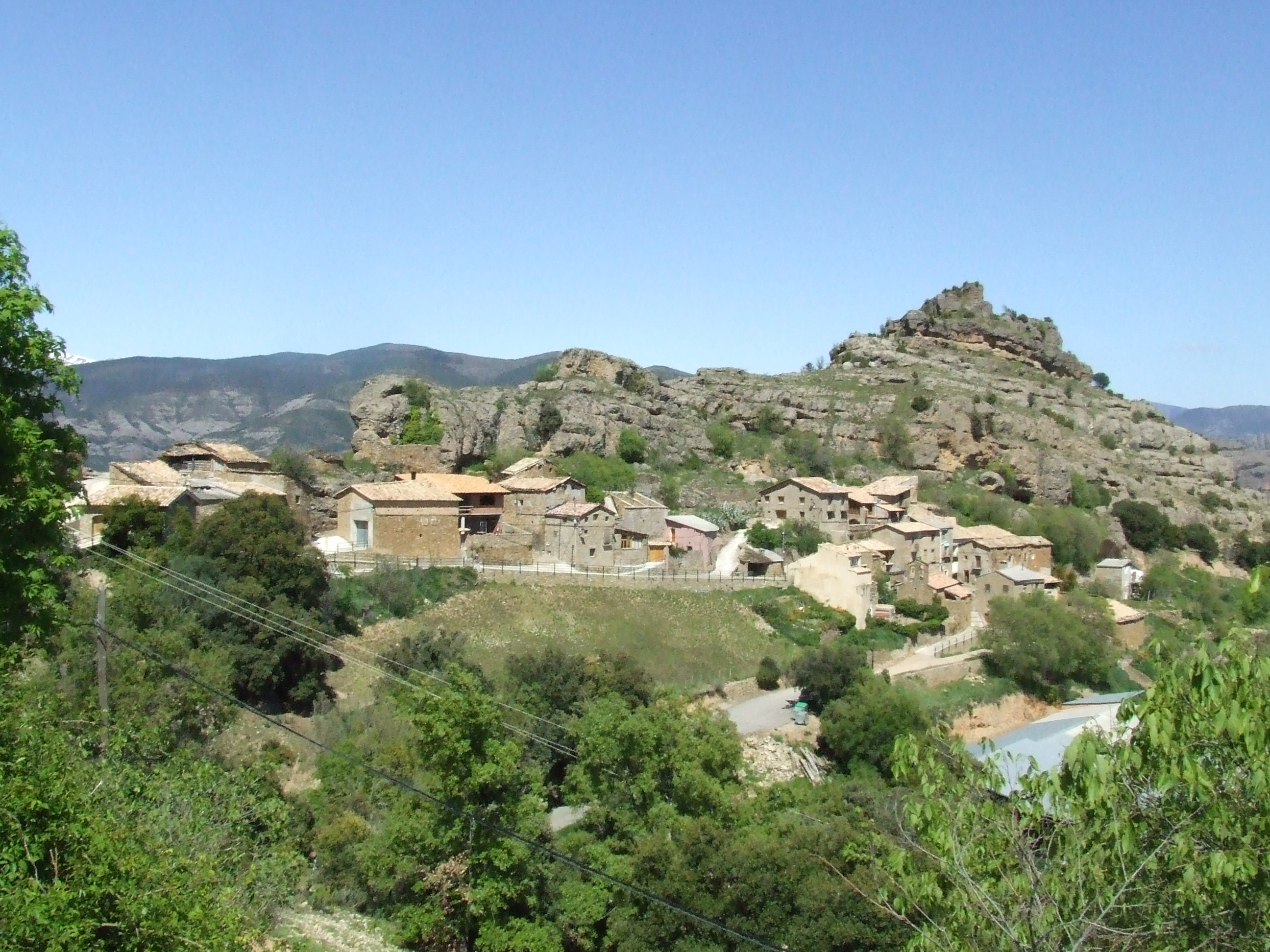 Vista general de Toralla des de migdia (Toralla i Serradell, Conca de Dalt, Pallars Jussà)